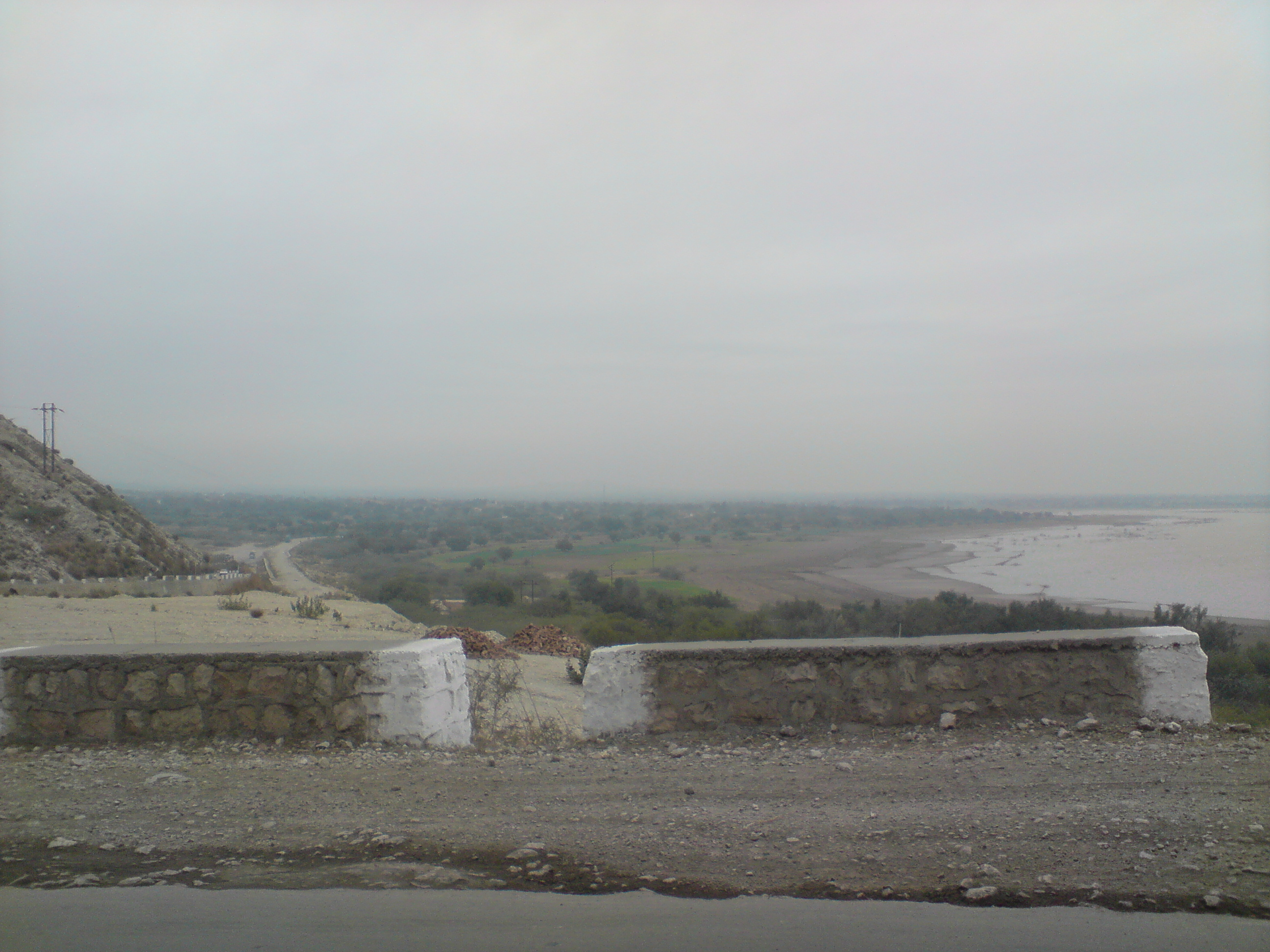 Namal Lake, Near Mianwali